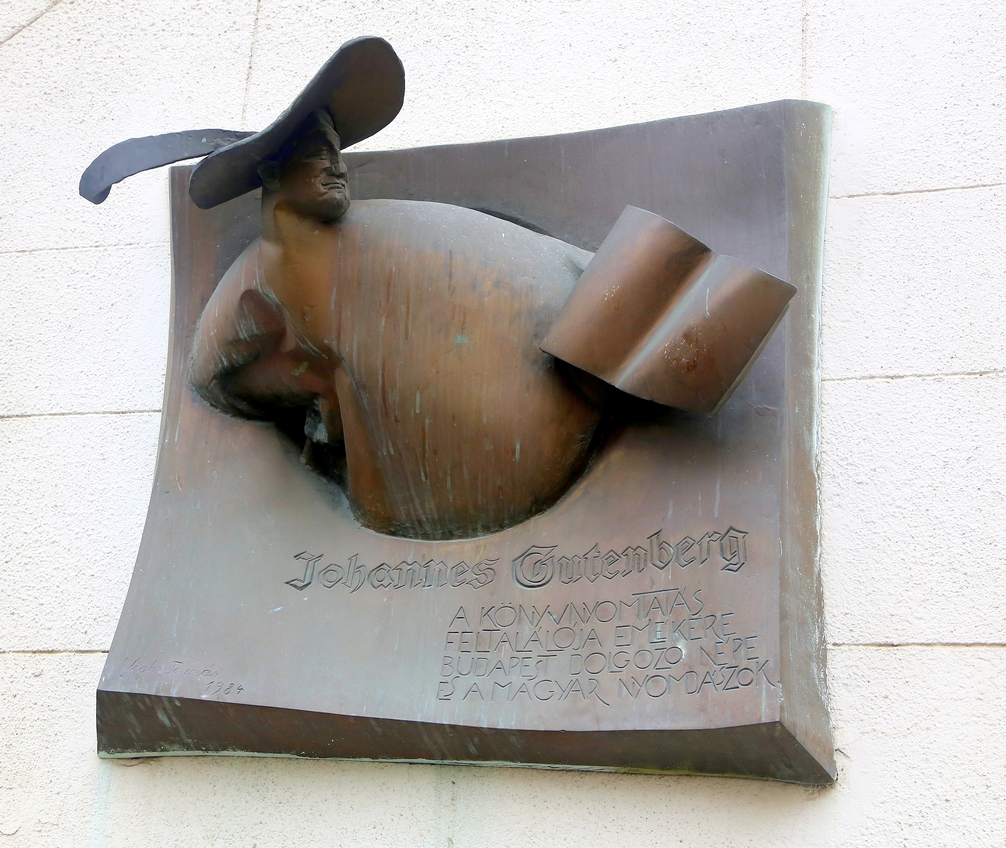 Johannes Gutenberg-emléktábla (Vigh Tamás, 1986). - Magyarország, Budapest, VIII. kerület, Gutenberg tér 4. Az épület falán jobboldalt látható.